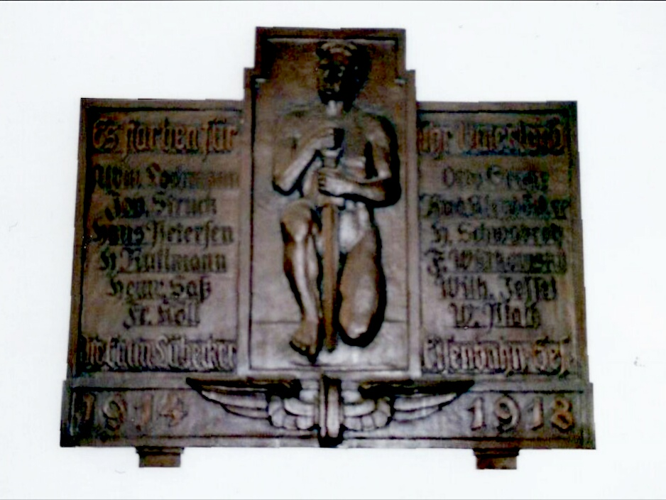 Denkmal der Eutin-Lübecker Eisenbahngesellschaft an deren Opfer im Ersten Weltkrieg